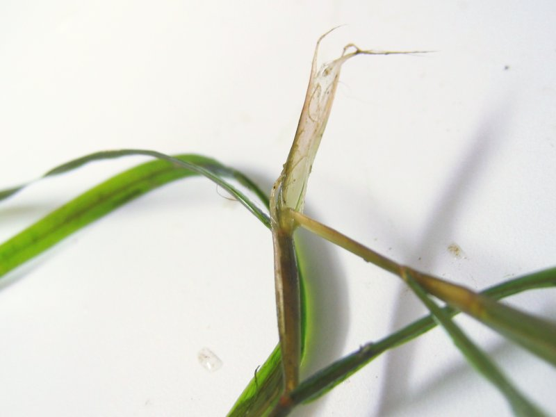 Flachstängeliges Laichkraut Potamogeton compressus, Müritz-Gebiet